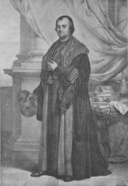 Pierre de Ram (1804-1865), recteur de l'Université catholique de Louvain (1834-1865).